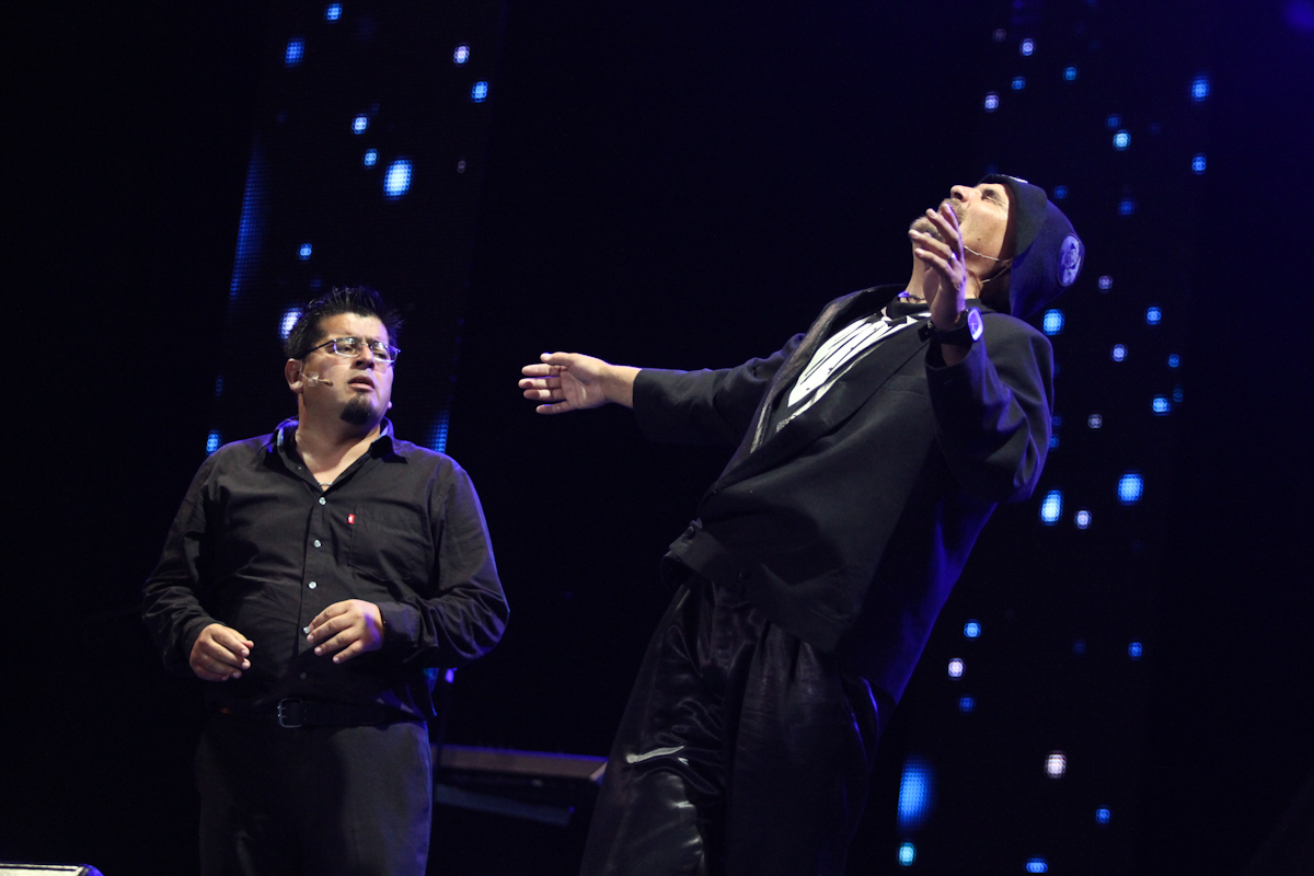 Humoristas chilenos, 2012.